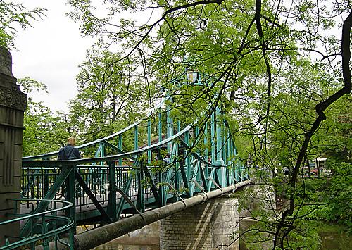 Zielony mostek, Opole